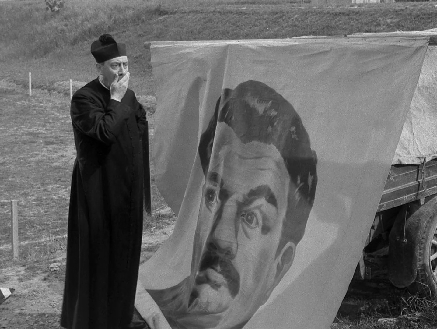 Don Camollo devant l'affiche de Peppone